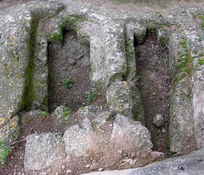 Dues de les tombes antropomorfes que poden veure en el jaciment